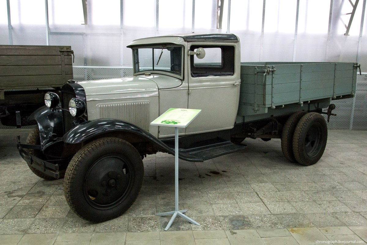 УАЗ-ГАЗ-АА (годы выпуска 1947-1951). Выставочный павильон-музей УАЗа.